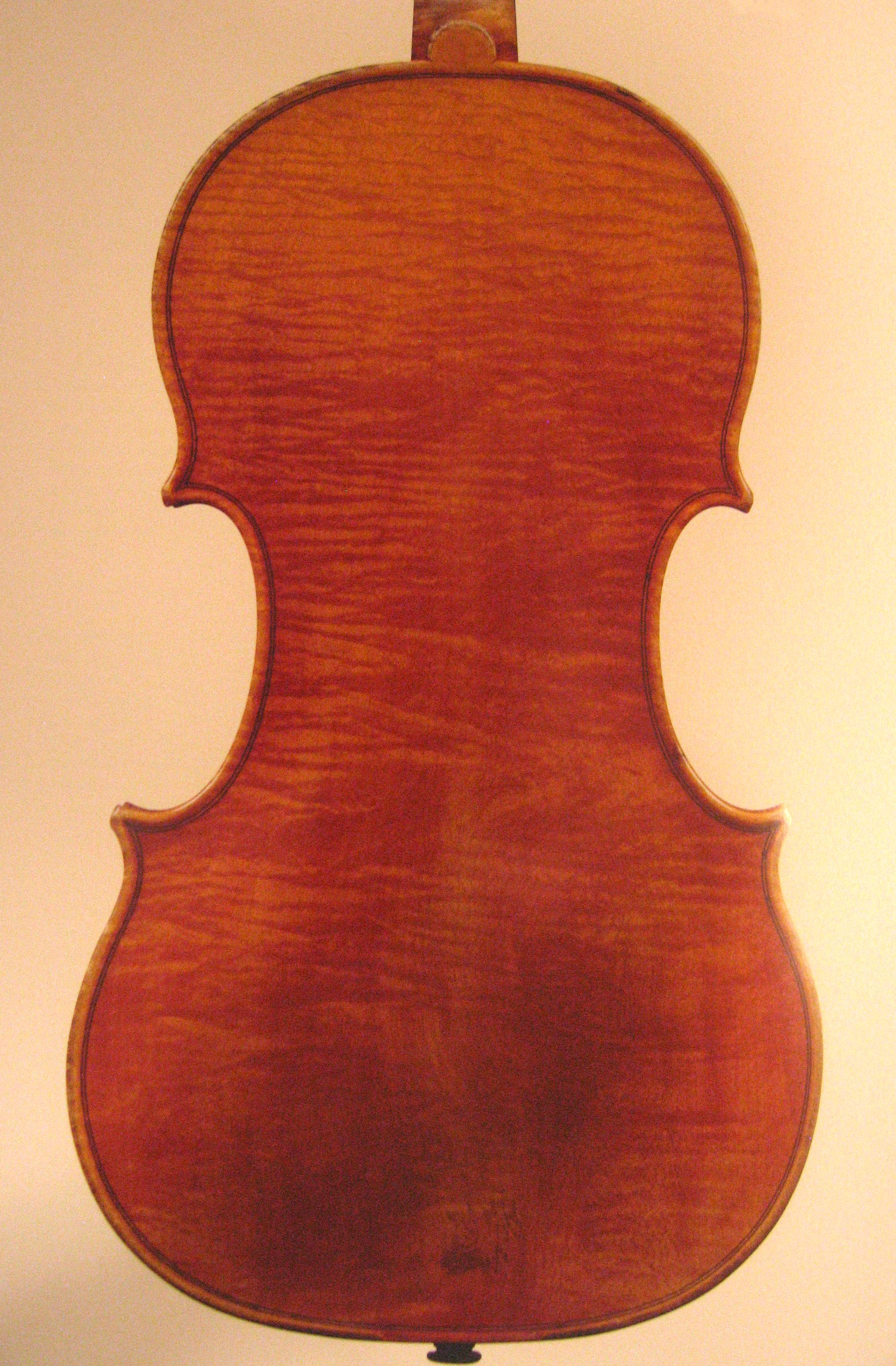 Igino Sderci violin back 1924